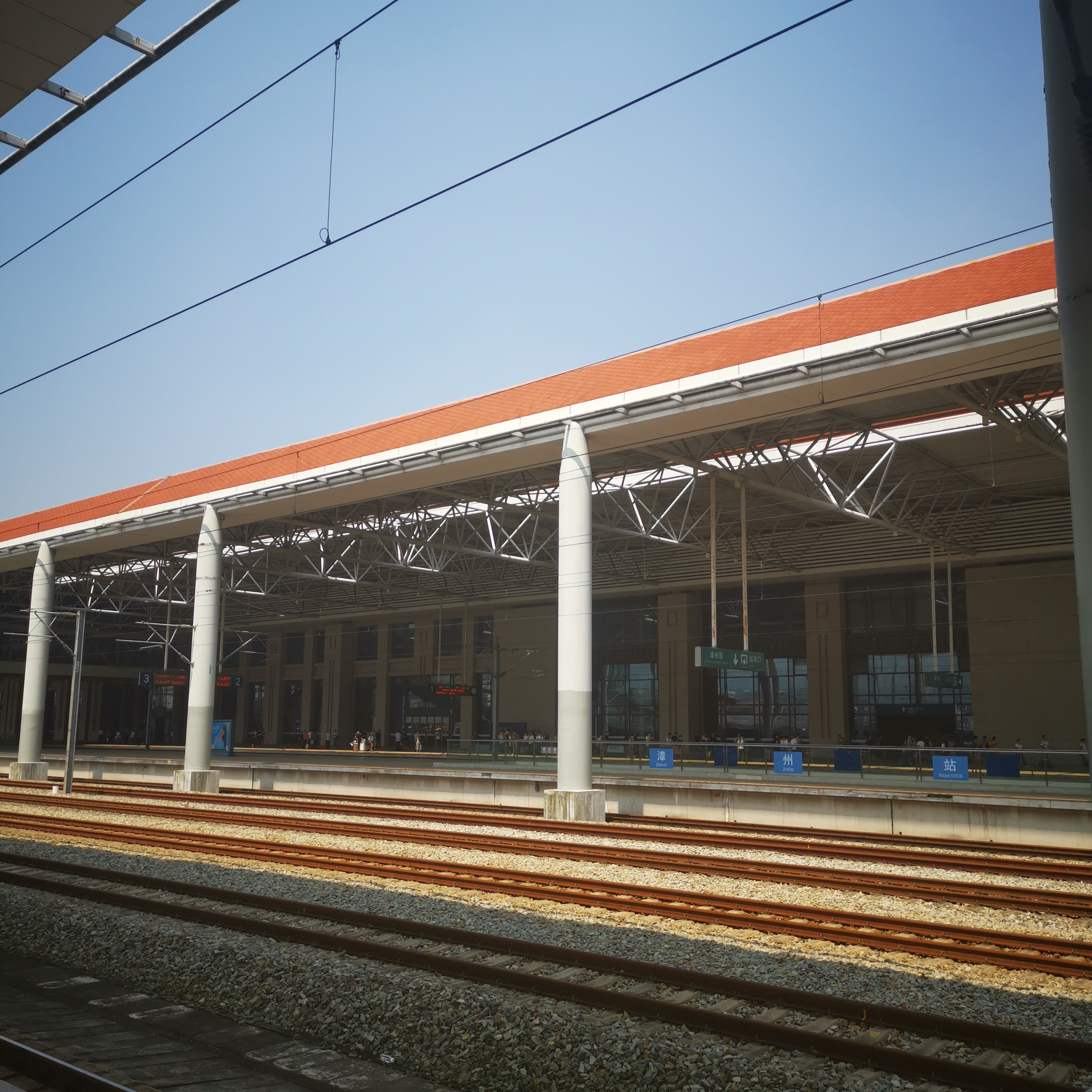 漳州站月台